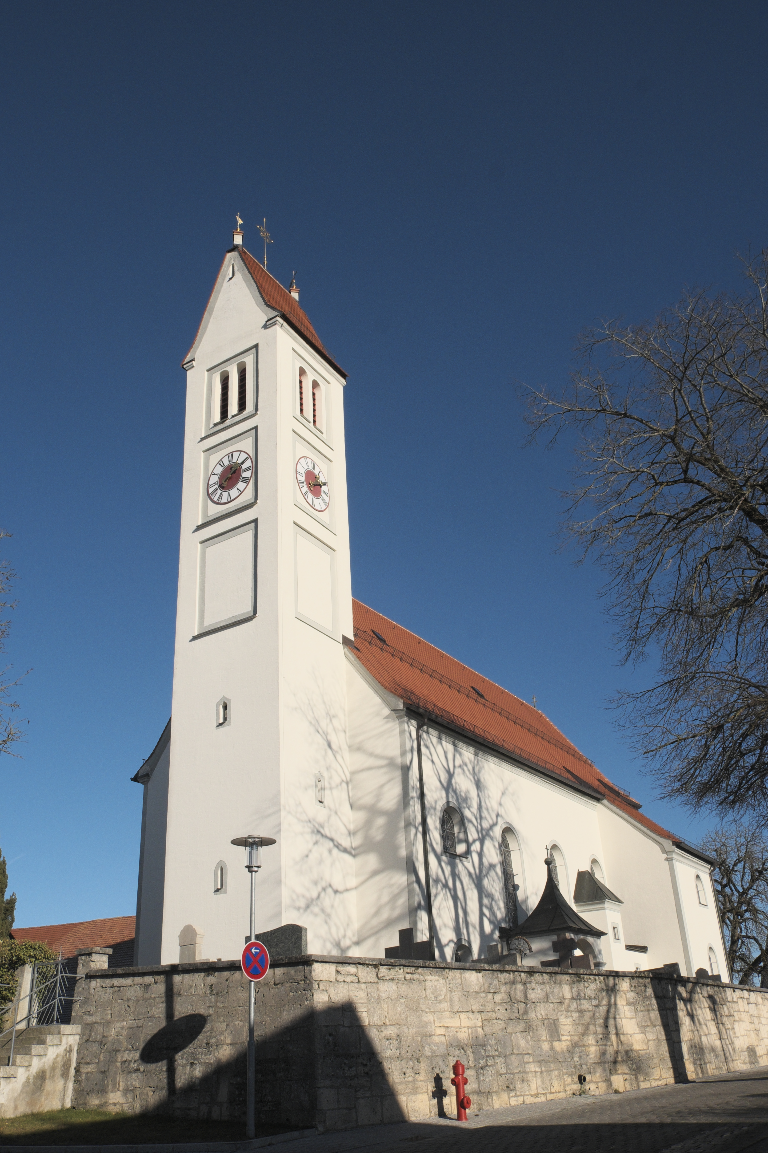 Katholische Pfarrkirche St. Johannes der Täufer in Stadl (Vilgertshofen) im oberbayerischen Landkreis Landsberg am Lech (Bayern/Deutschland)